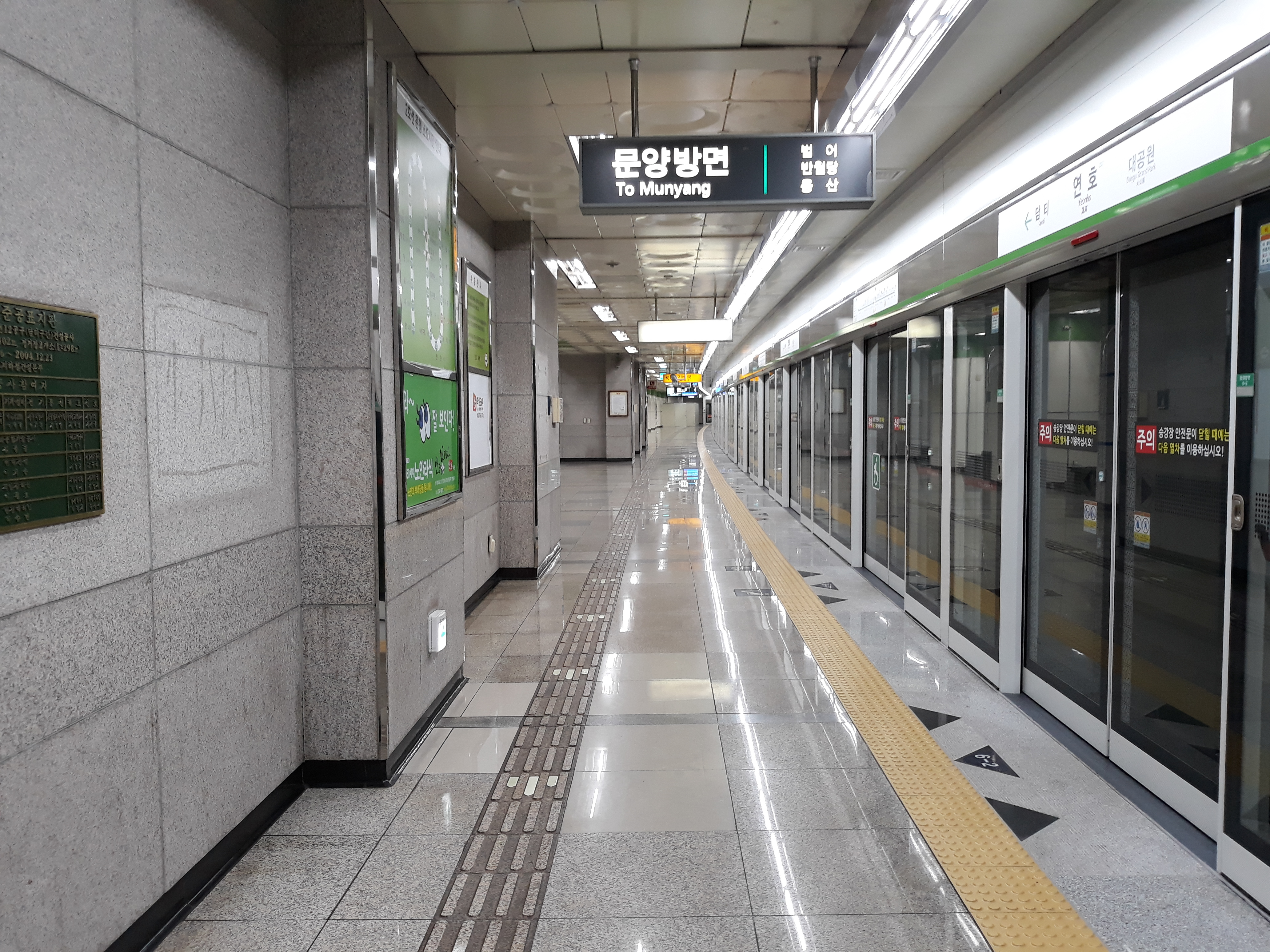 대구 도시철도 2호선 연호역 문양 방면 승강장